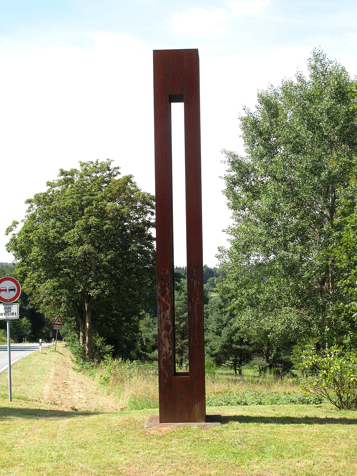 Joachim Koch, Peilung, 1996, - Deutschland, Rheinland-Pfalz, Skulpturenweg Trippstadt-Stelzenberg